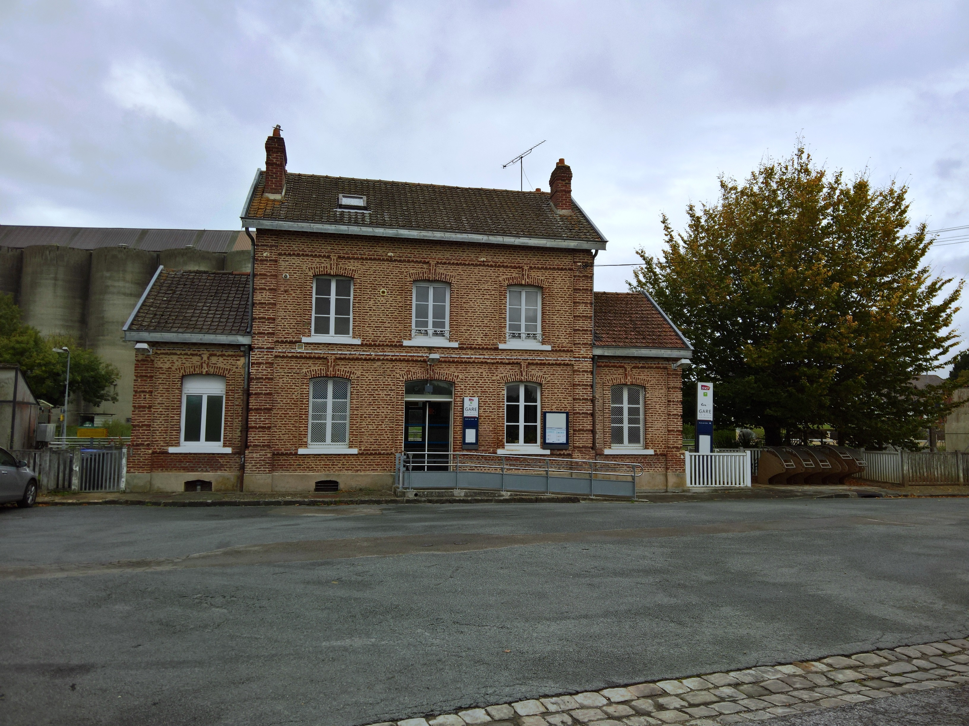 Façade de la gare de Milly-sur-Thérain, désormais accessible PMR